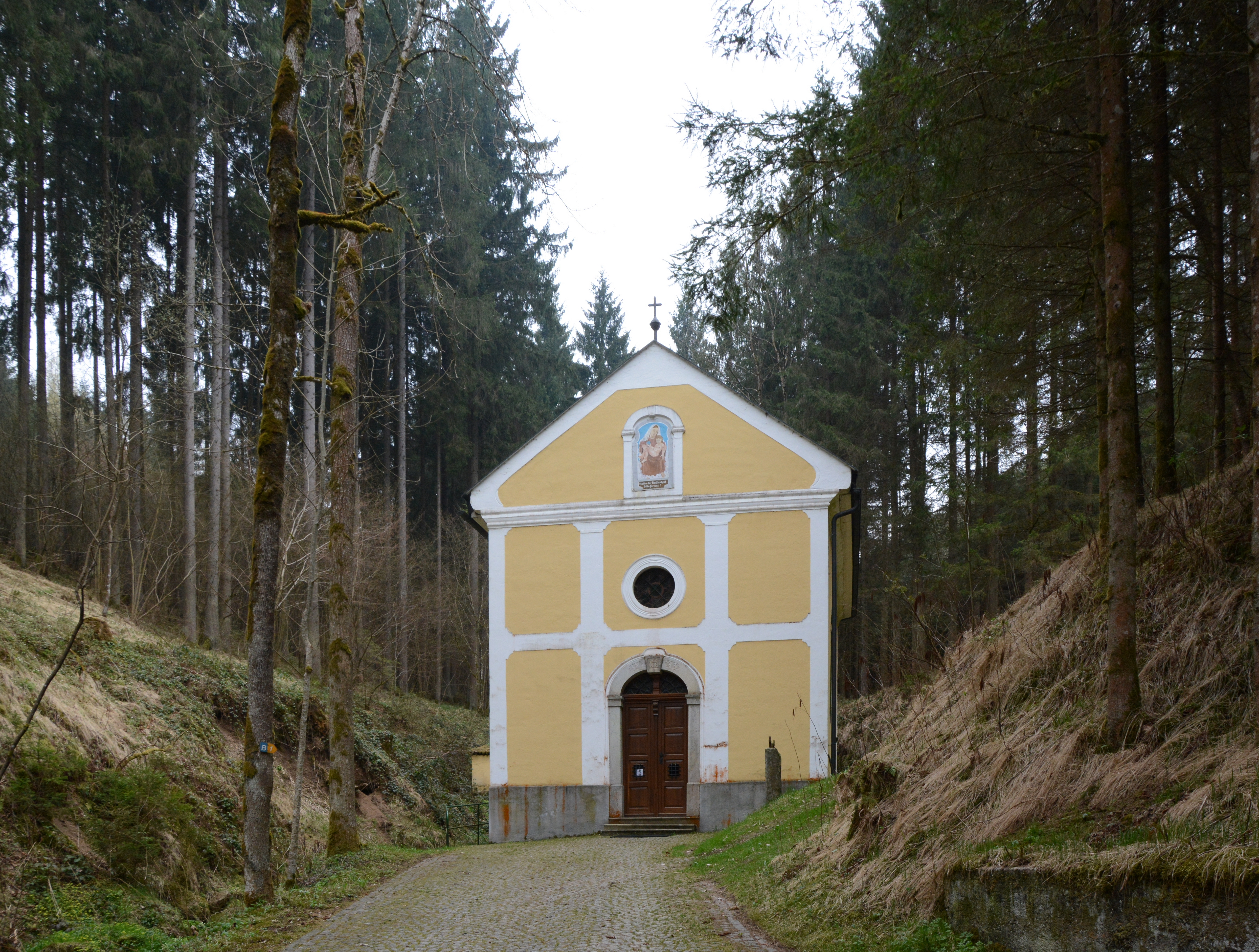 Wallfahrtskirche Maria Poetsch in der Gemeinde Altenfelden, Oberösterreich.